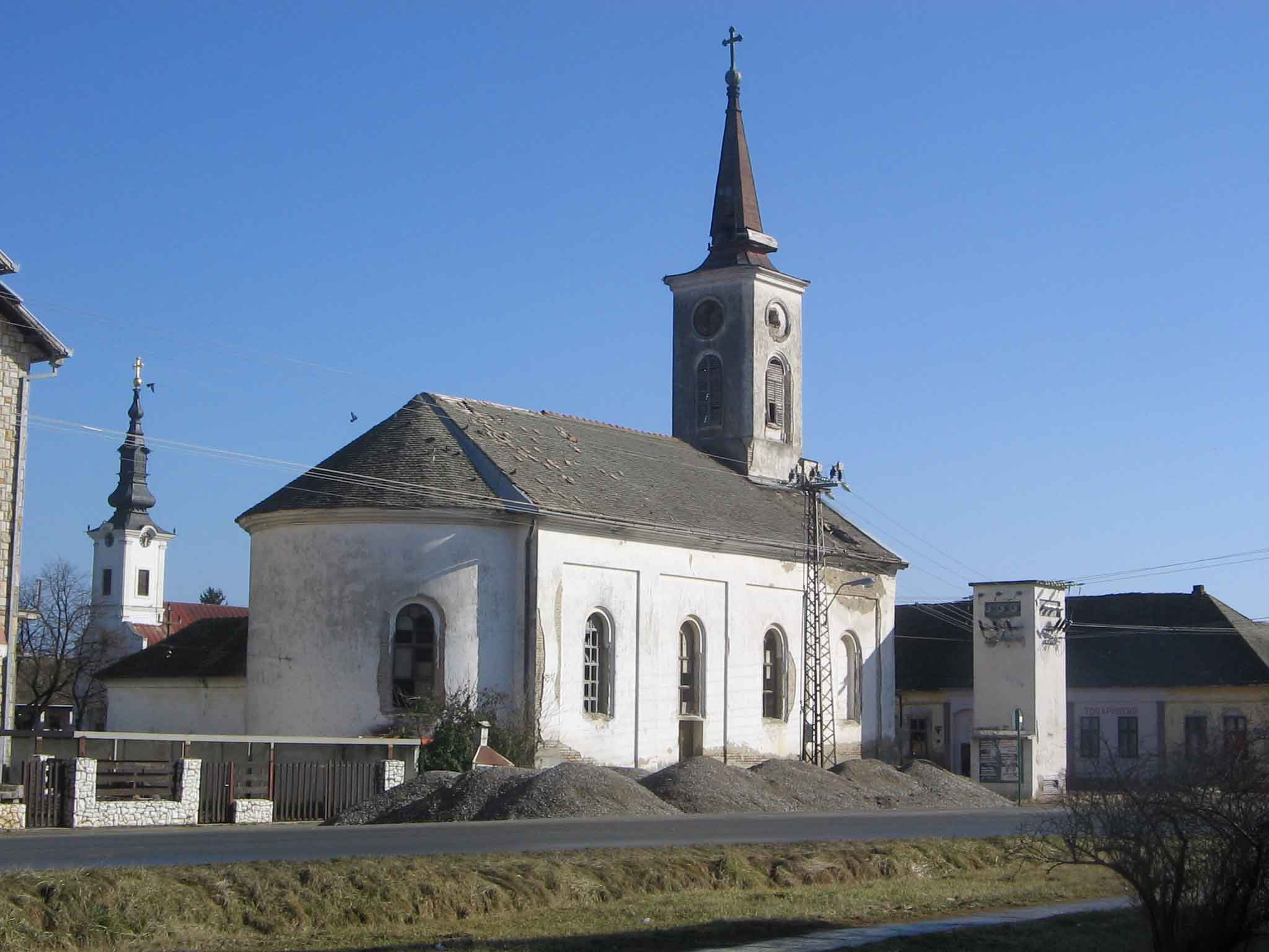 Римокатоличка црква Светог Карла Бормејског